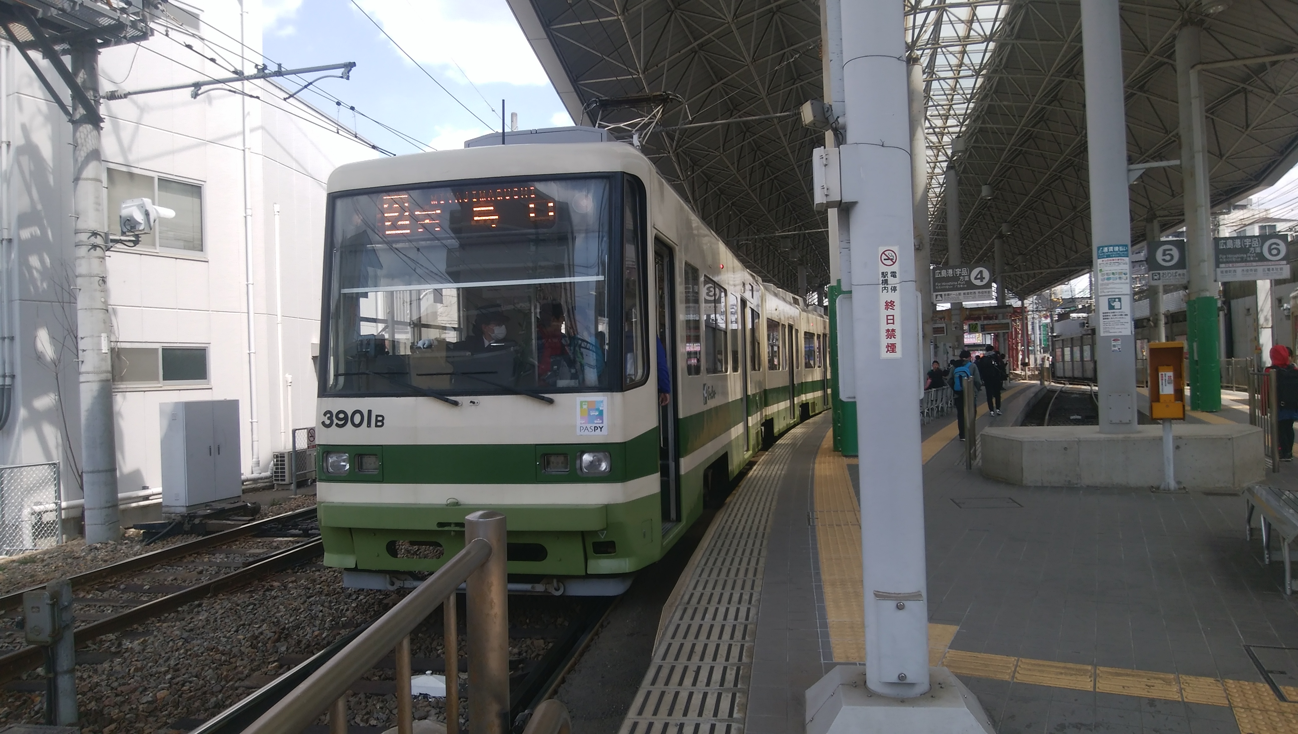 LED方向幕の広電3901号